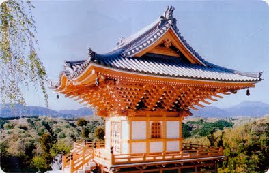 念佛宗三寶山無量壽寺 九州本山の地蔵堂